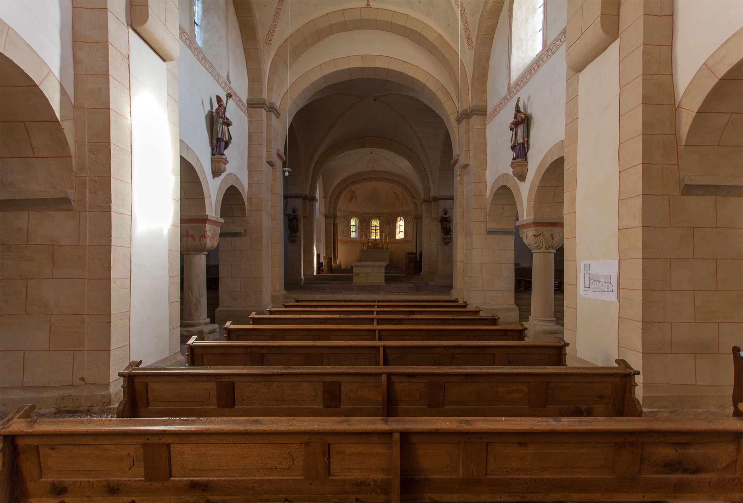 Kilianskirche (Lügde), InnenraumThis is a photograph of an architectural monument.